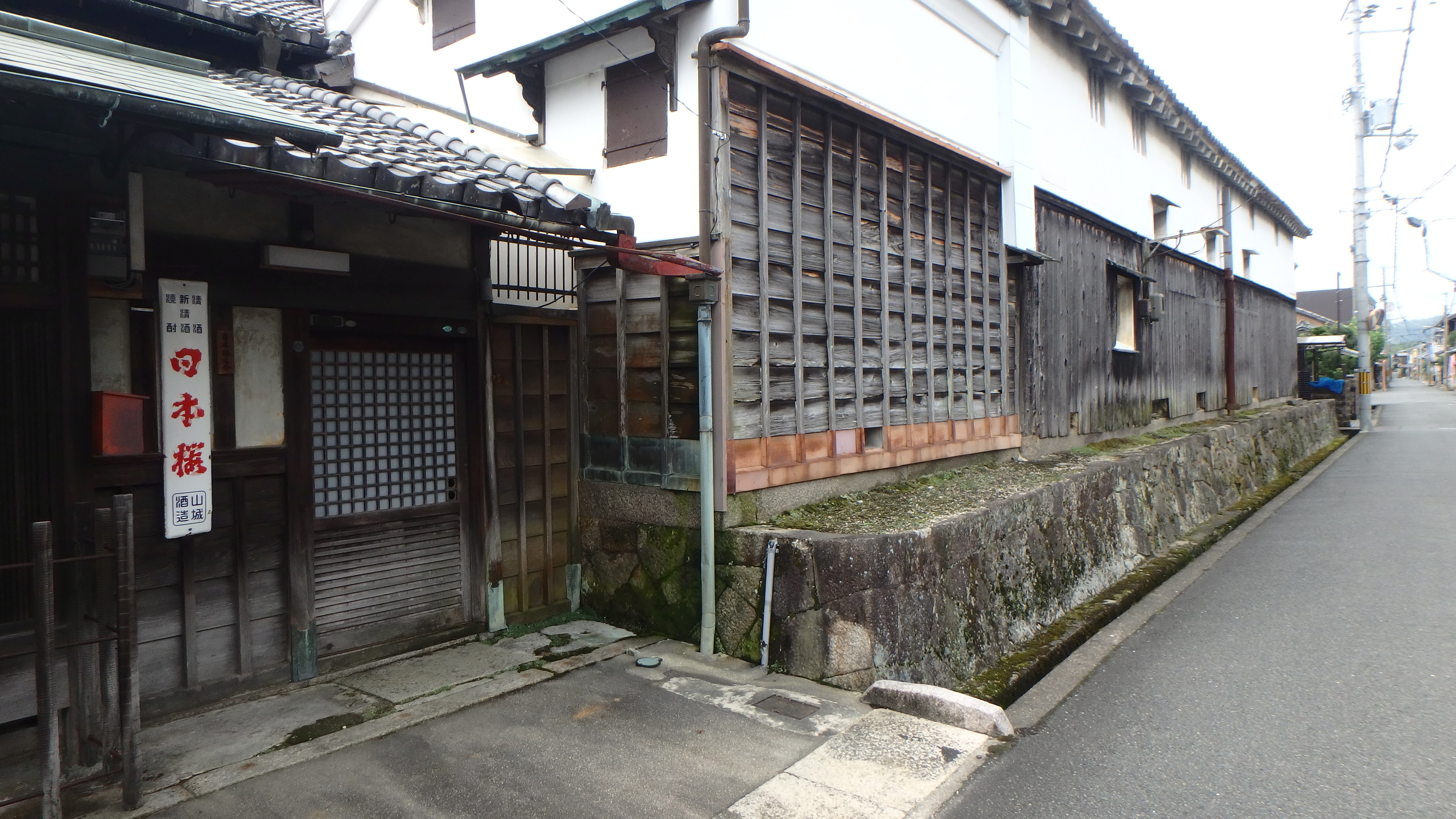 木津川市加茂町船屋地区の街並み